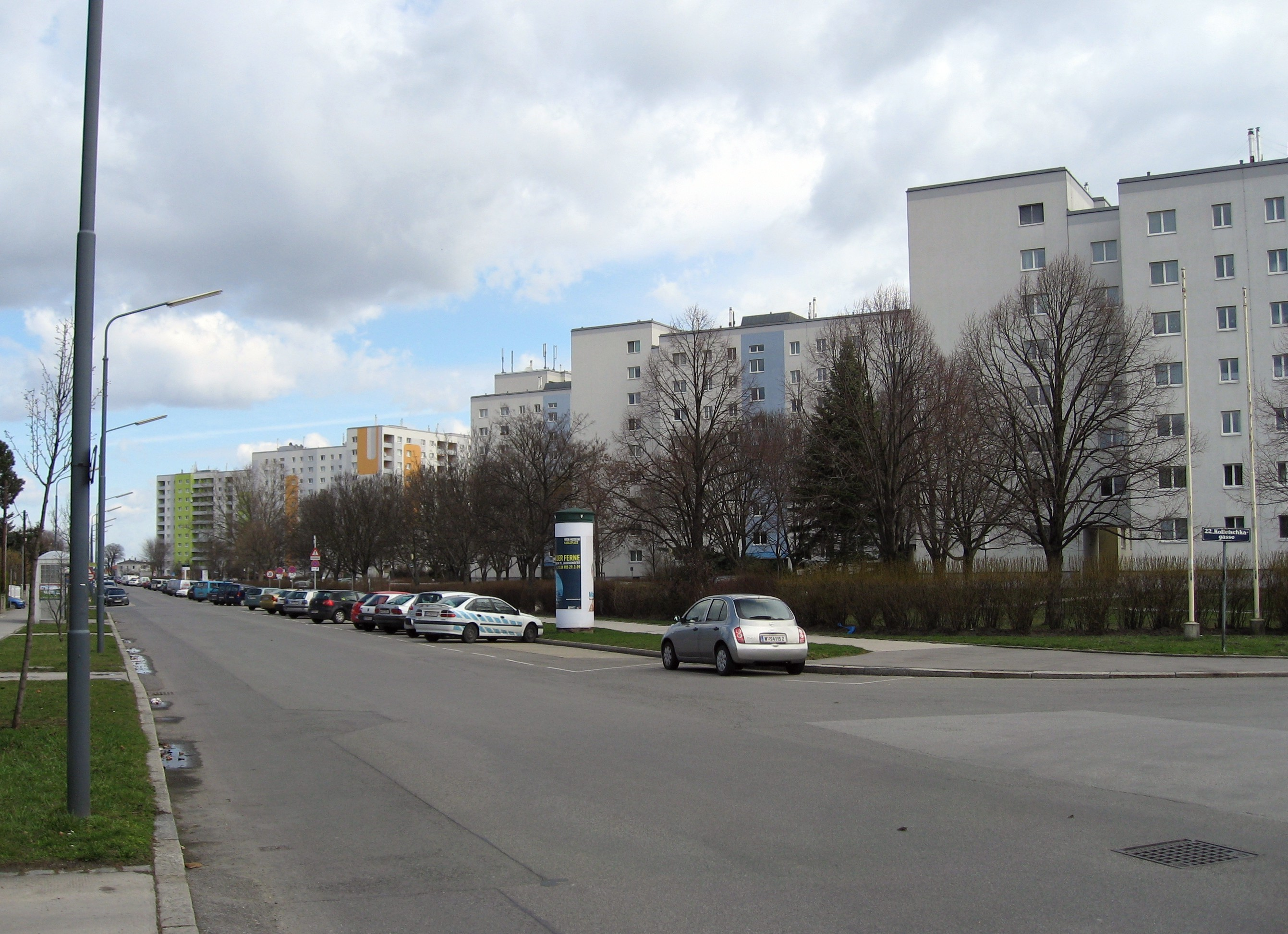 Ziegelhofstraße in Hirschstetten